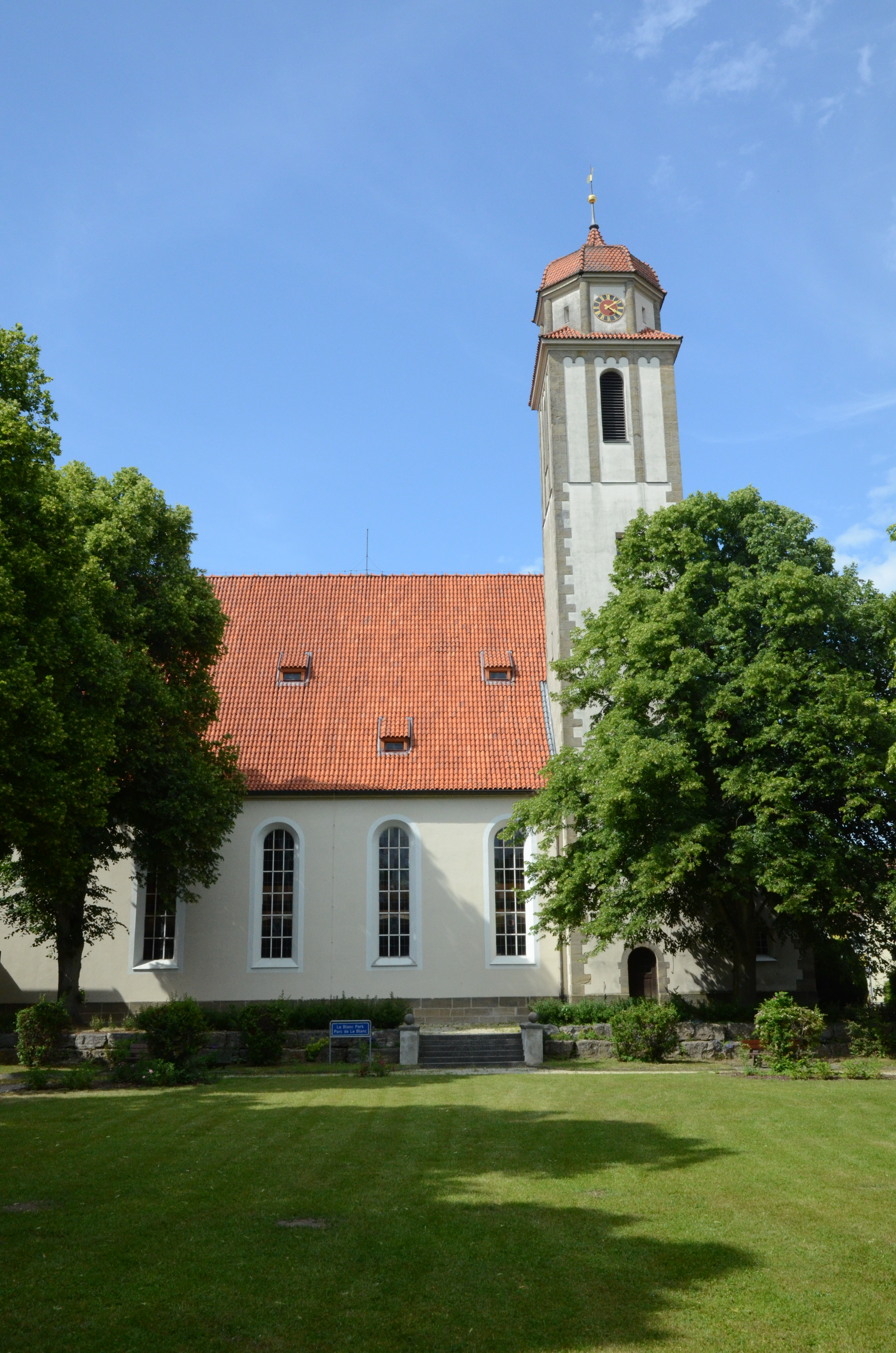 Bechhofen St. Johannis